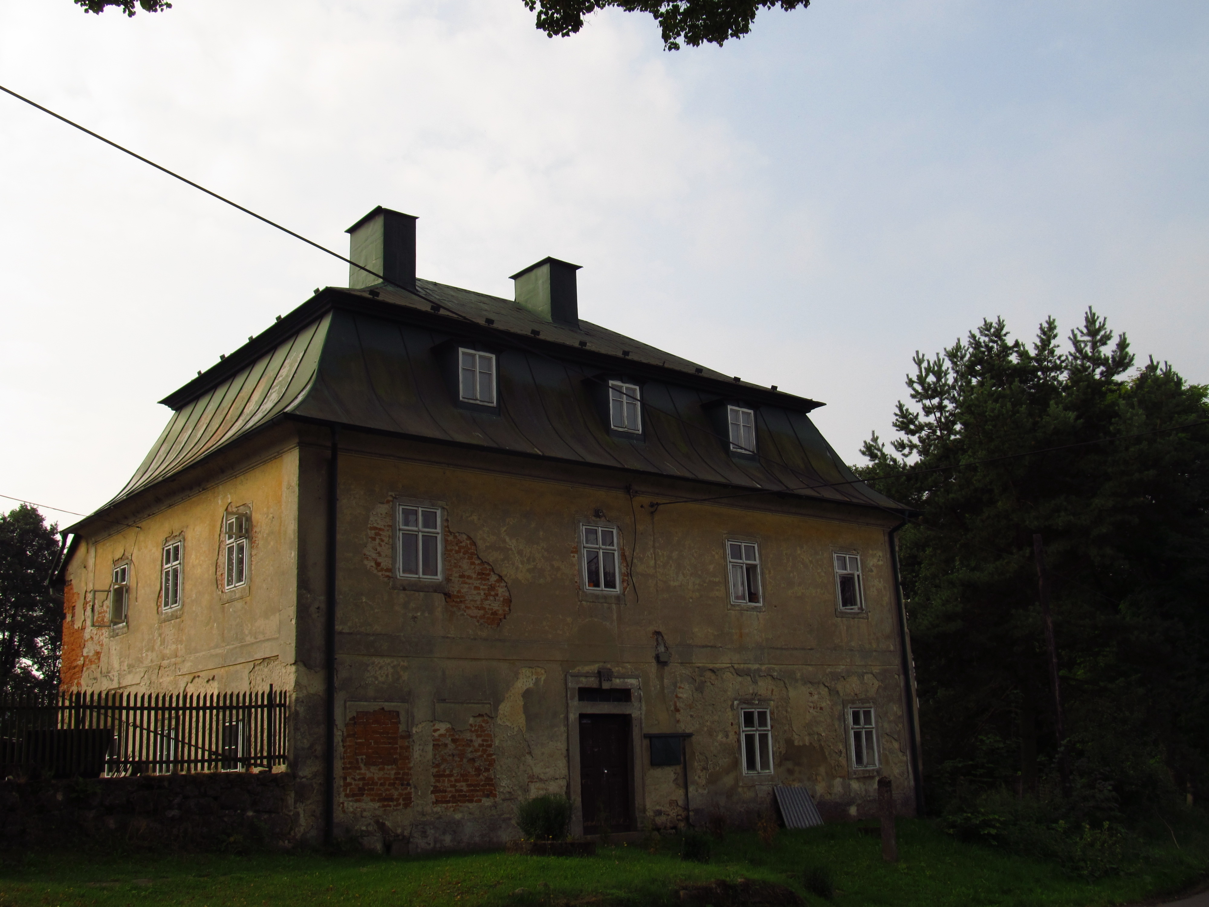 Fara, Křižany 235, západní část obce, u kostela, Křižany.